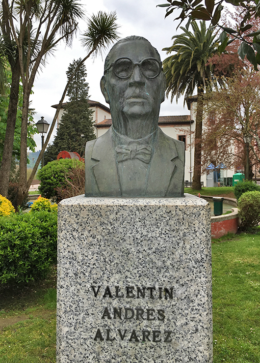 Busto homenaje a Valentín Andrés